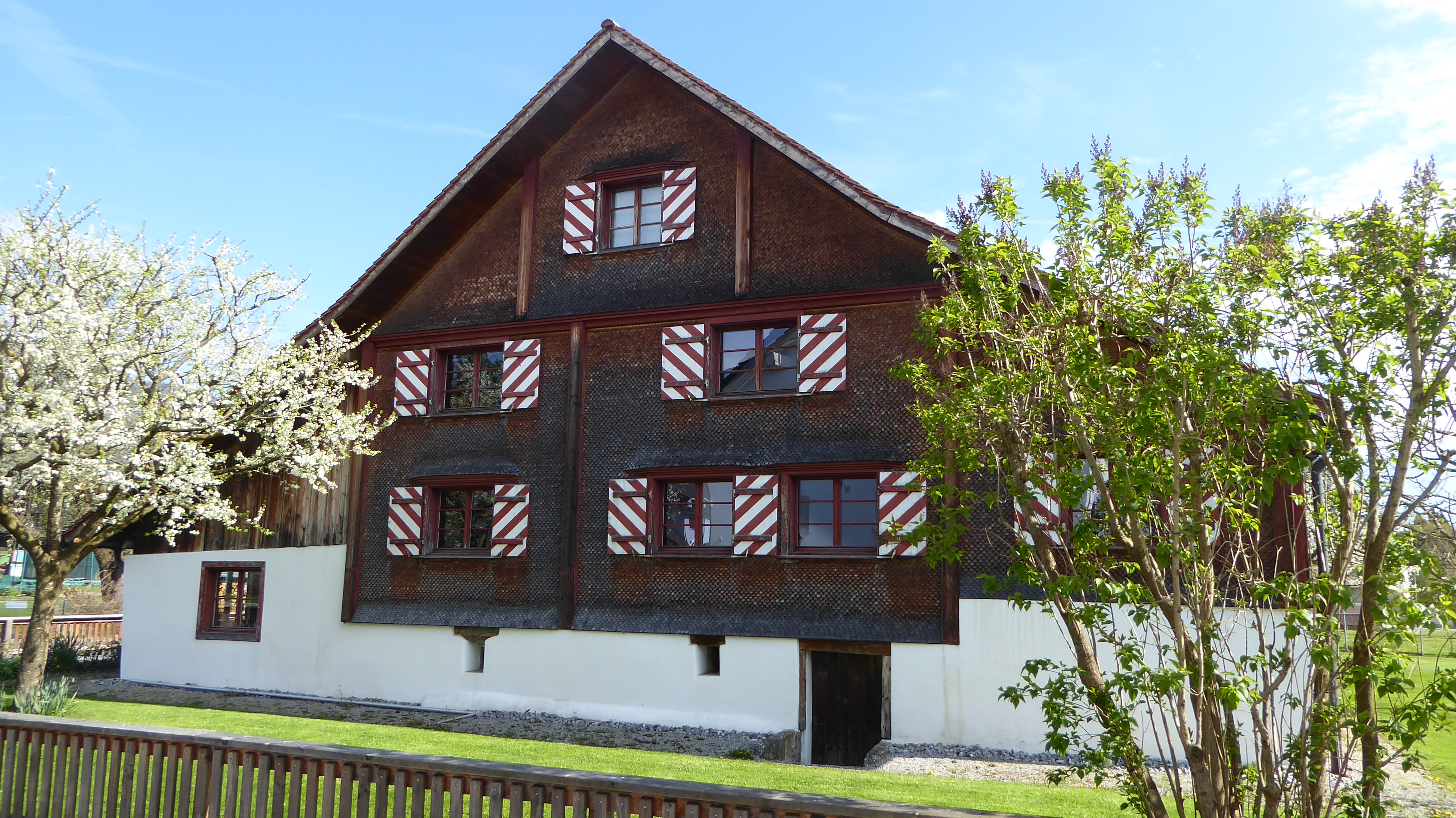 Küfer-Martis-Hus in Ruggell